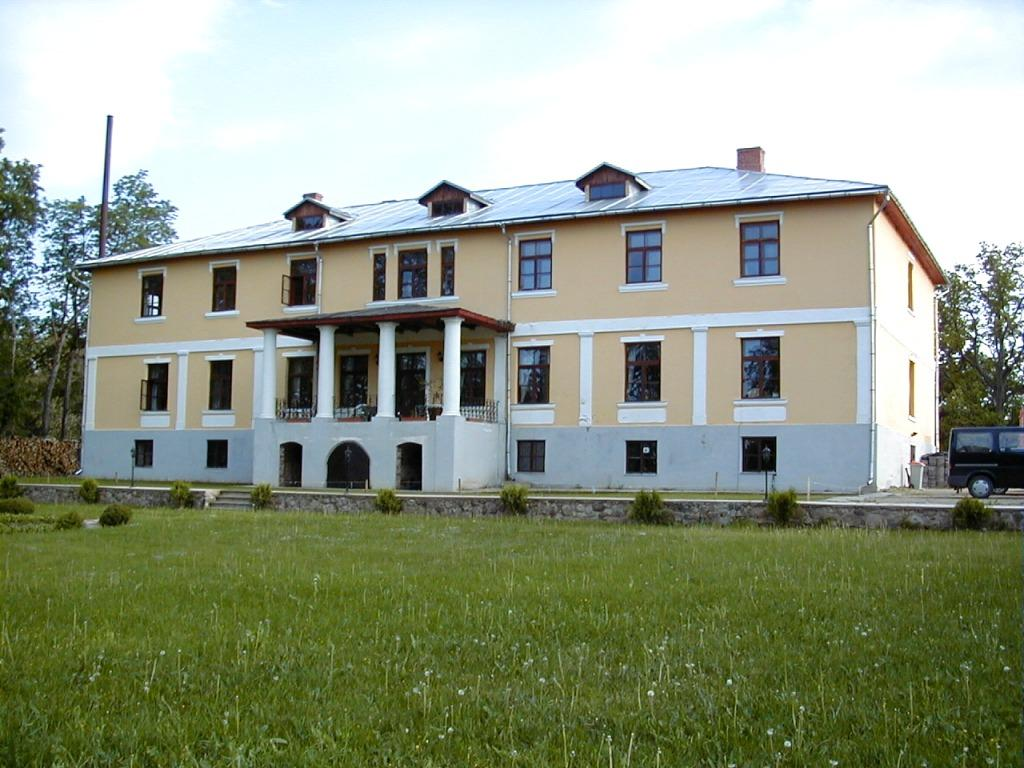 Grašu muižas pils 2000-05-27